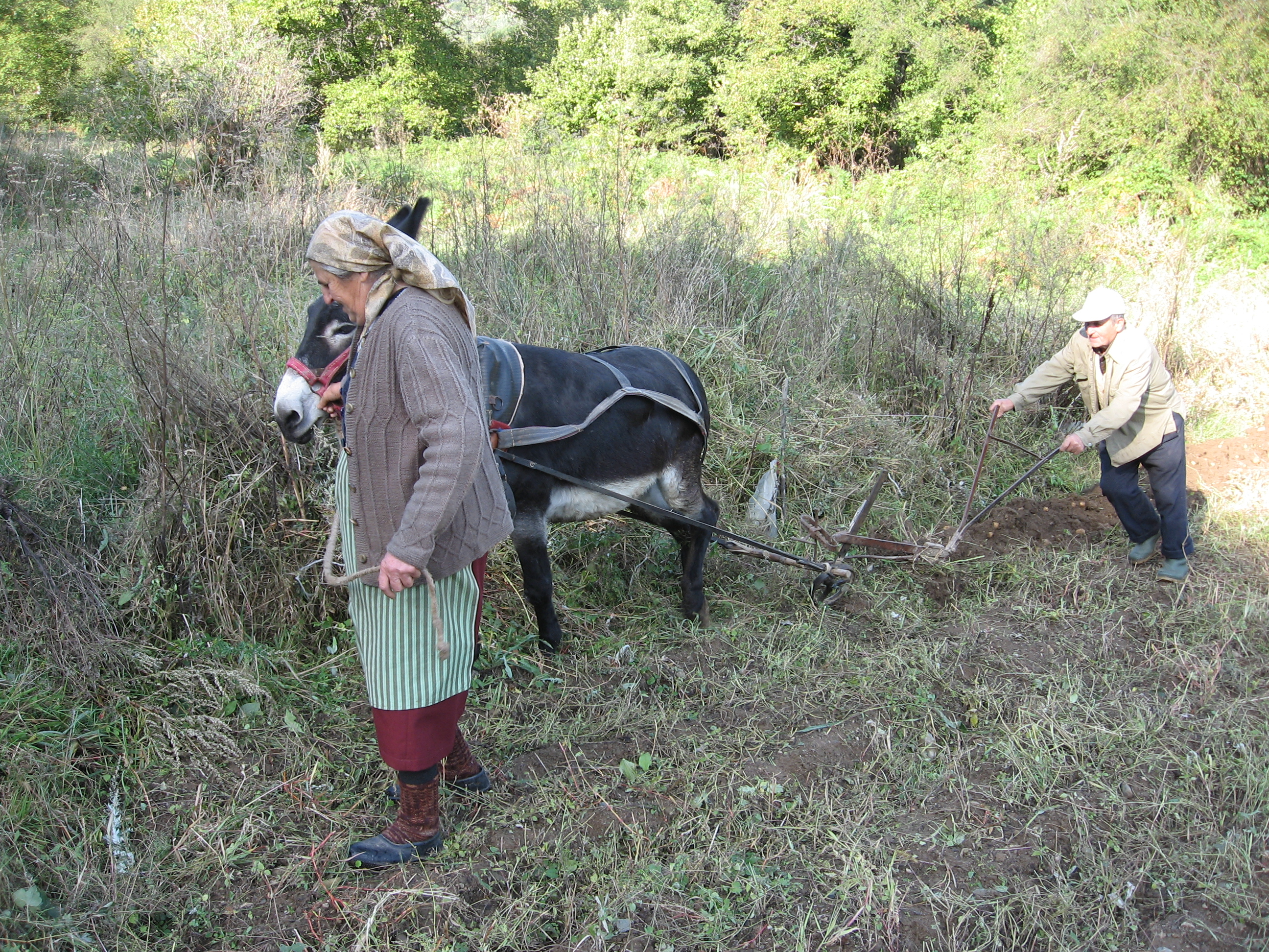 На браздата... в 21 век